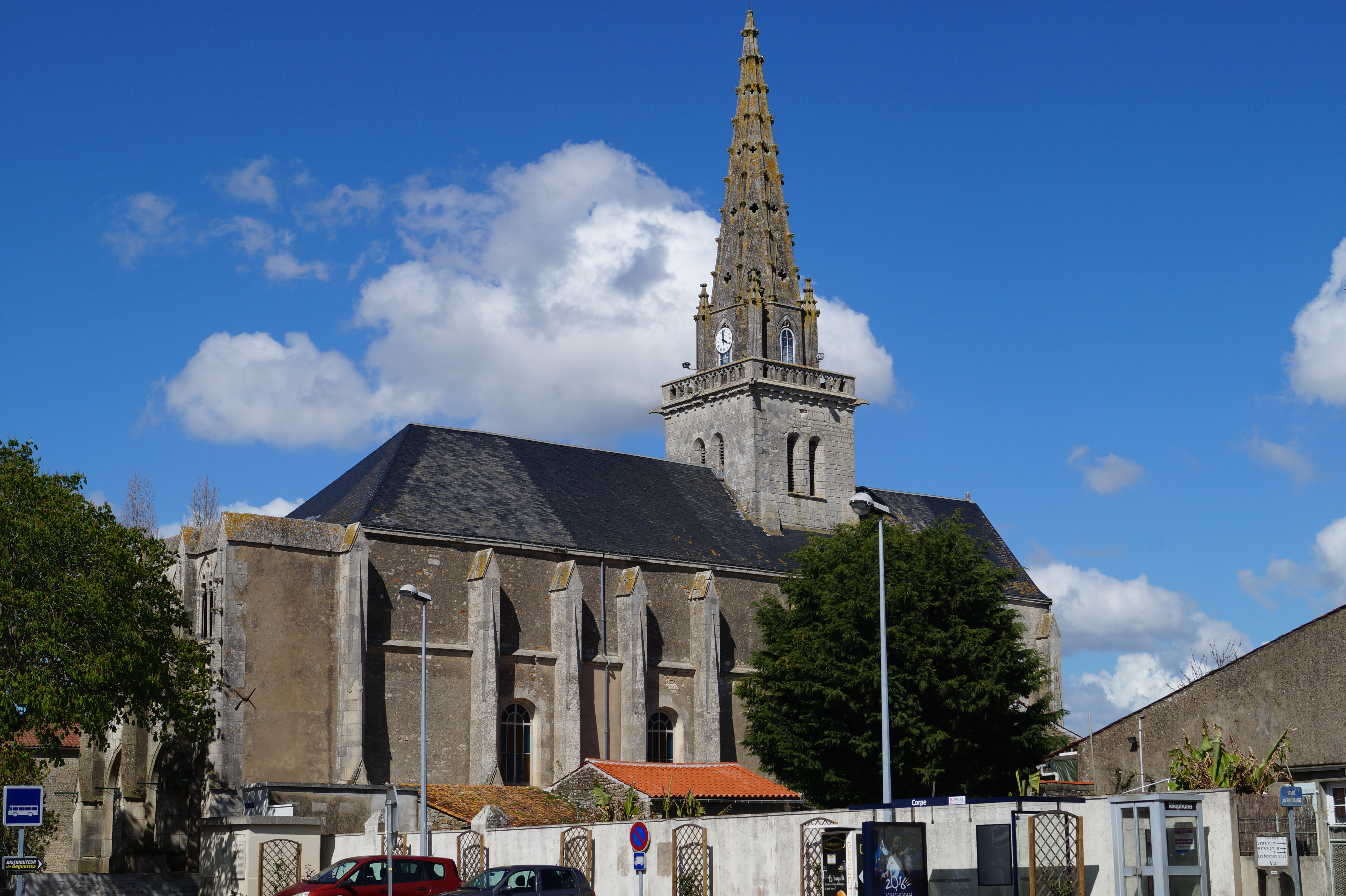 L’église Saint-Éphrem de Corpe depuis la rue de la Frise.